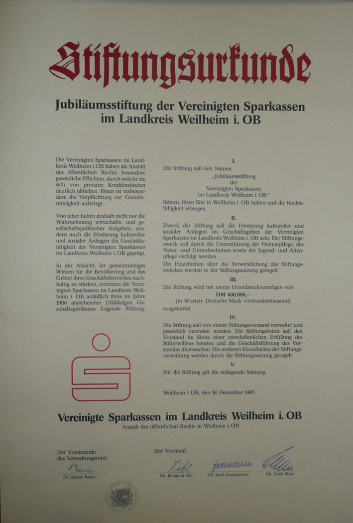 Stiftungsurkunde zur Gründung der Jubiläumsstiftung der Vereinigten Sparkassen